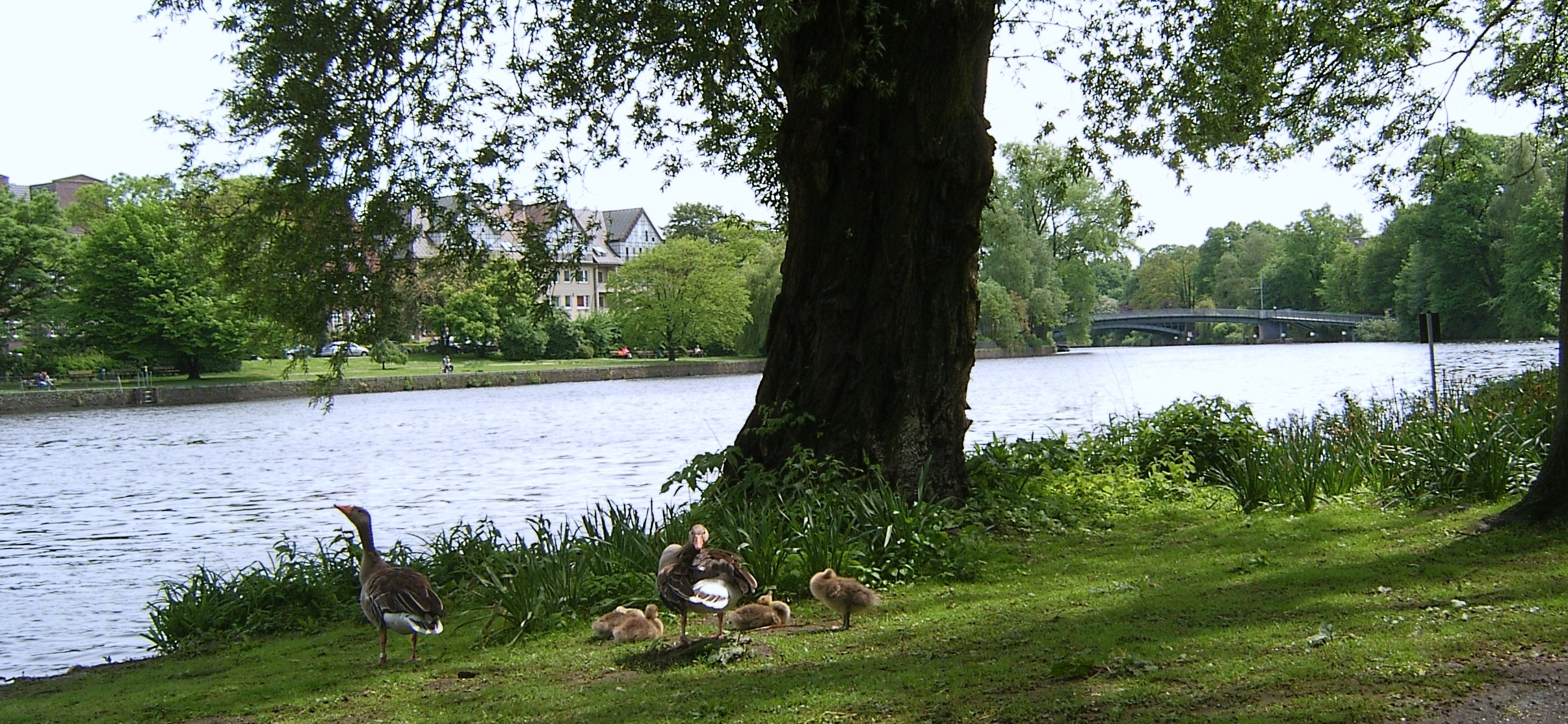 Hamburg, Eppendorf, Hayns Park